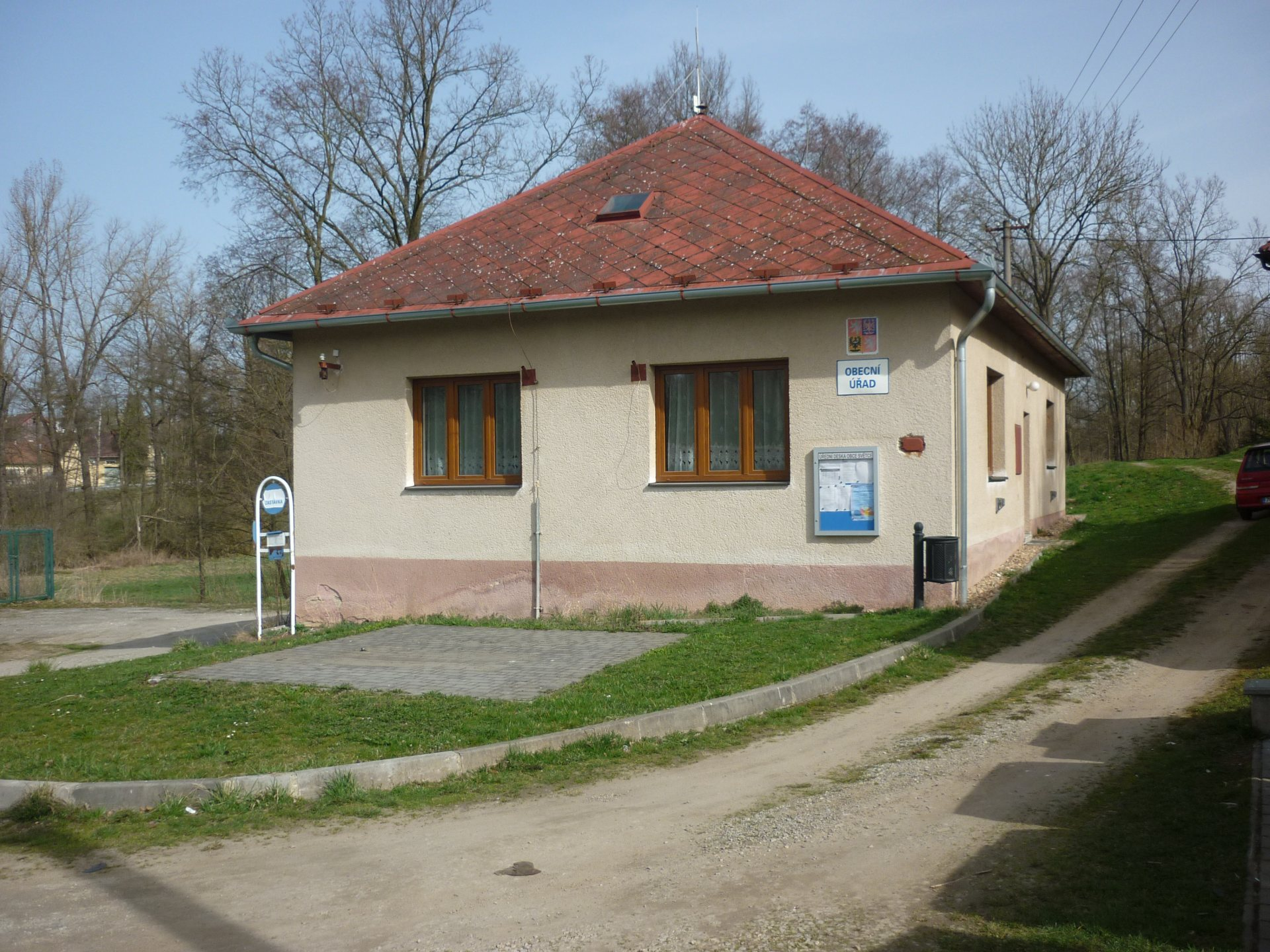 Světce, obecní úřad